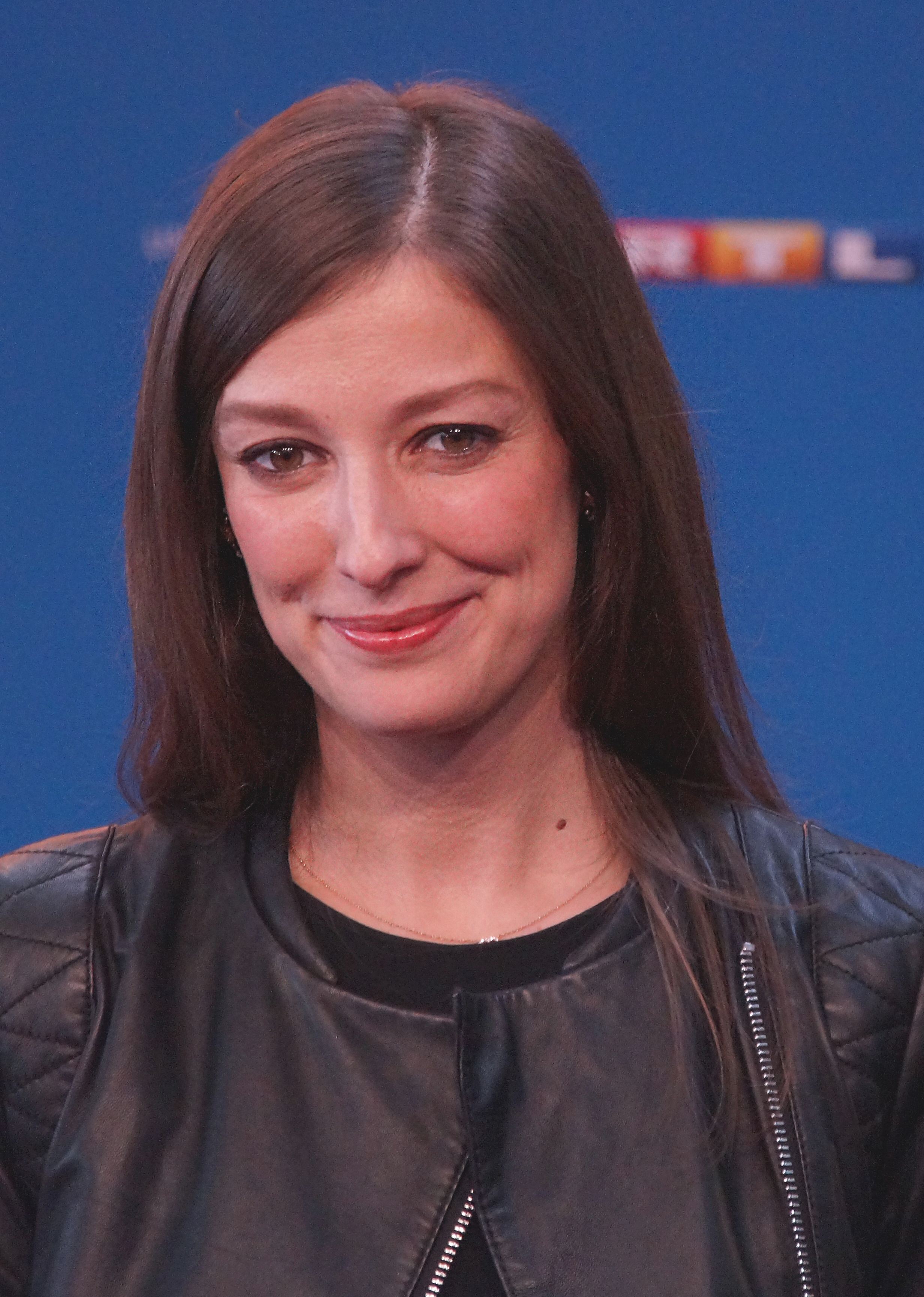 Alexandra Maria Lara bei der Europa-Premiere von dem neuen Animationsfilm "SING", am 27.11.2016 im Kölner Cinedom.